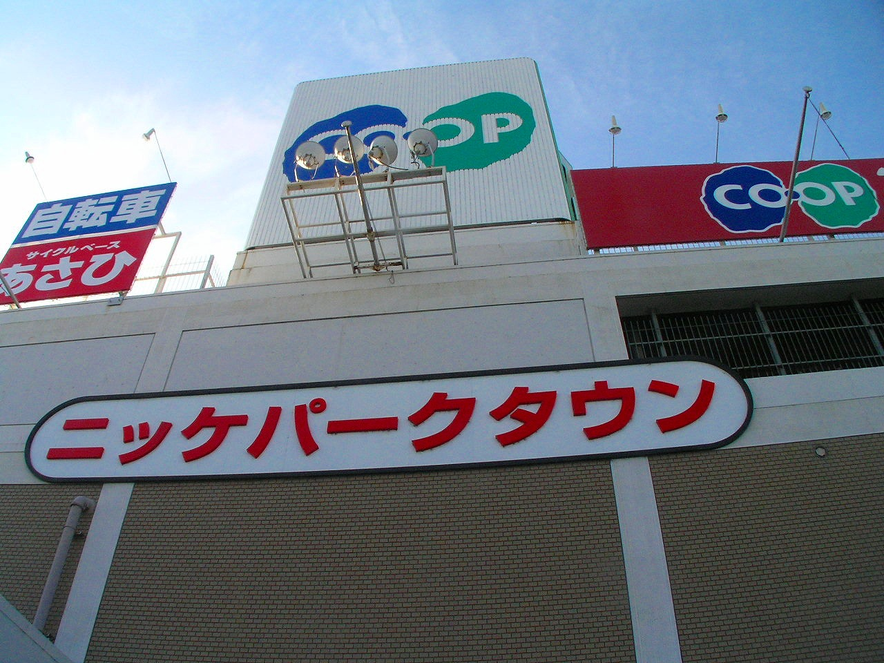 ニッケパークタウン（NIKKE PARKTOWN）は、兵庫県加古川市にある複合型ショッピングセンターである。 運営は日本毛織株式会社。 日本毛織が加古川事業所を縮小した際、その遊休地の利用法として計画された。 ダイエーを核店舗に64の専門店とスポーツ施設などを擁し、1984年2月8日に開業した。 しかし90年代から周辺地域に多数の商業施設が乱立、県内有数の激戦区となった結果、集客力が徐々に低下していた。 1997年に敷地を西側に拡大し、ディックホームセンター（現：ホームセンターダイキ）と大型ボウリング場「ニッケパークボウル」が営業を開始したが、2002年末に核店舗のダイエーが経営再建のために閉店、開業以来の危機的状況に陥った。 日本毛織はこれに対し新たな核店舗の早急な誘致や、計画段階だったパークタウン全体の改装計画の前倒しを発表。 翌2003年3月、2階部分にミドリ電化がオープン、同6月には1階部分にコープこうべ、ザ・ダイソー、アルカドラッグなどがオープンした。 更に2004年11月に店舗全体を改装・増築し、71の専門店群をニッケレポスとしてオープンさせた。